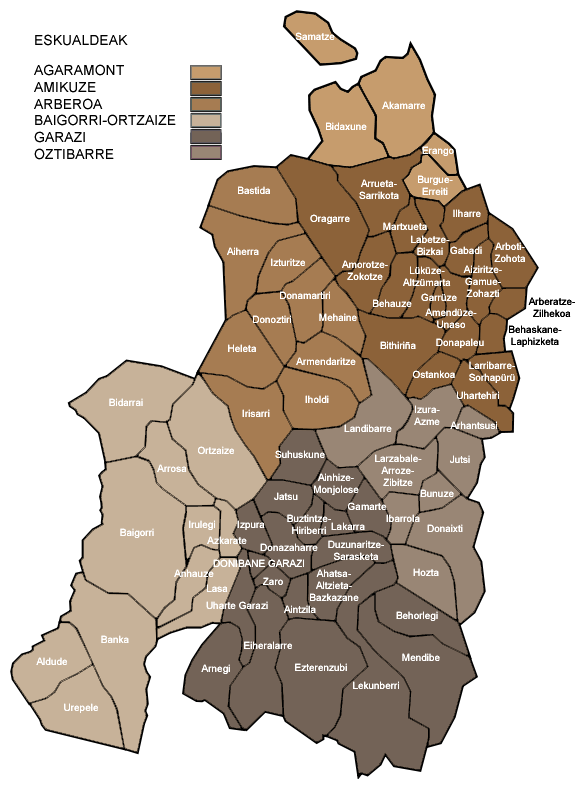 Mapa de la provincia histórica de Baja Navarra (Basse Navarre en francés, Nafarroa Beherea en euskera) con sus municipios (nombres en euskera según Euskaltzaindia).